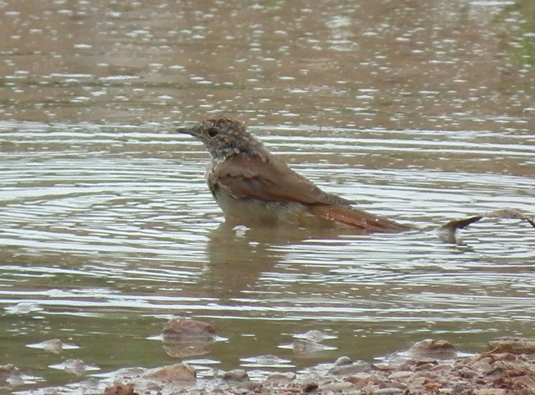 Badender Nachtigall in Feldrandnähe, aufgenommen in Heidelberg (Baden-Württemberg, Deutschland)